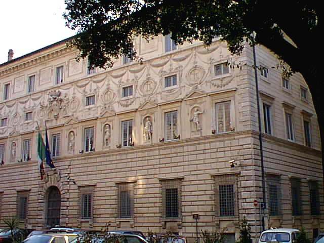 Roma, Palazzo Spada